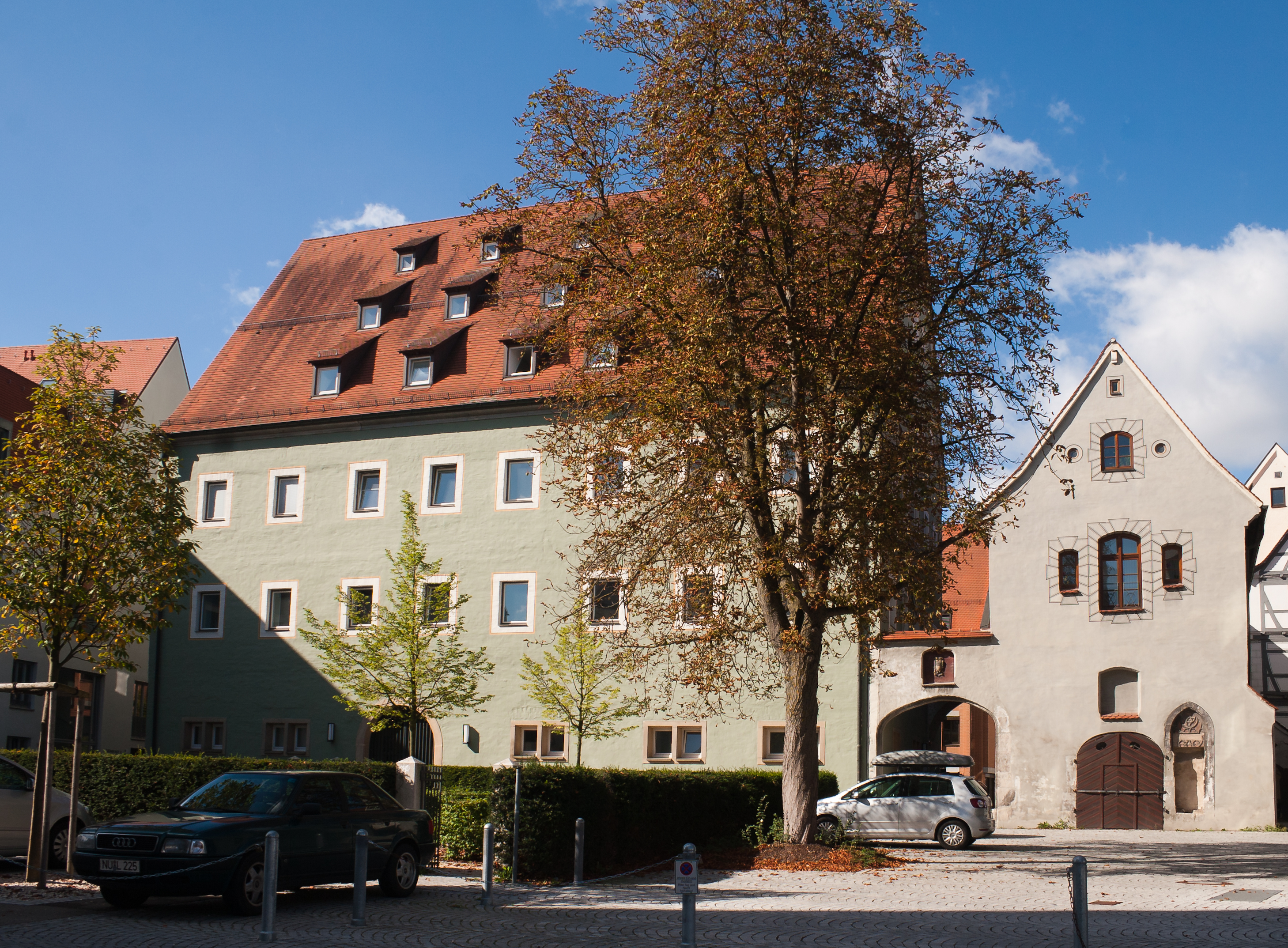 Ulm, Baden-Württemberg, Germany